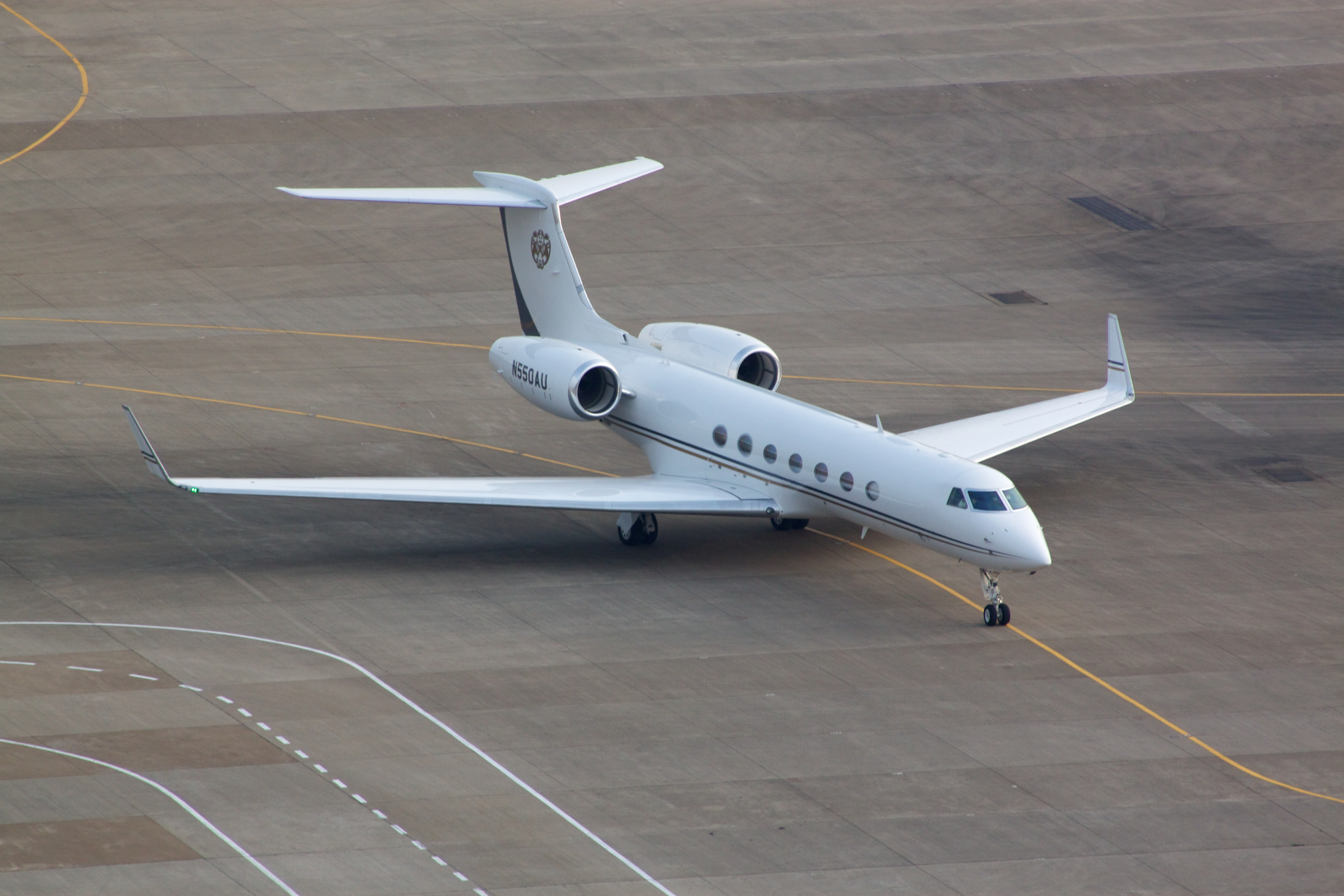 N550AU | Gulfstream G550 | MACAU